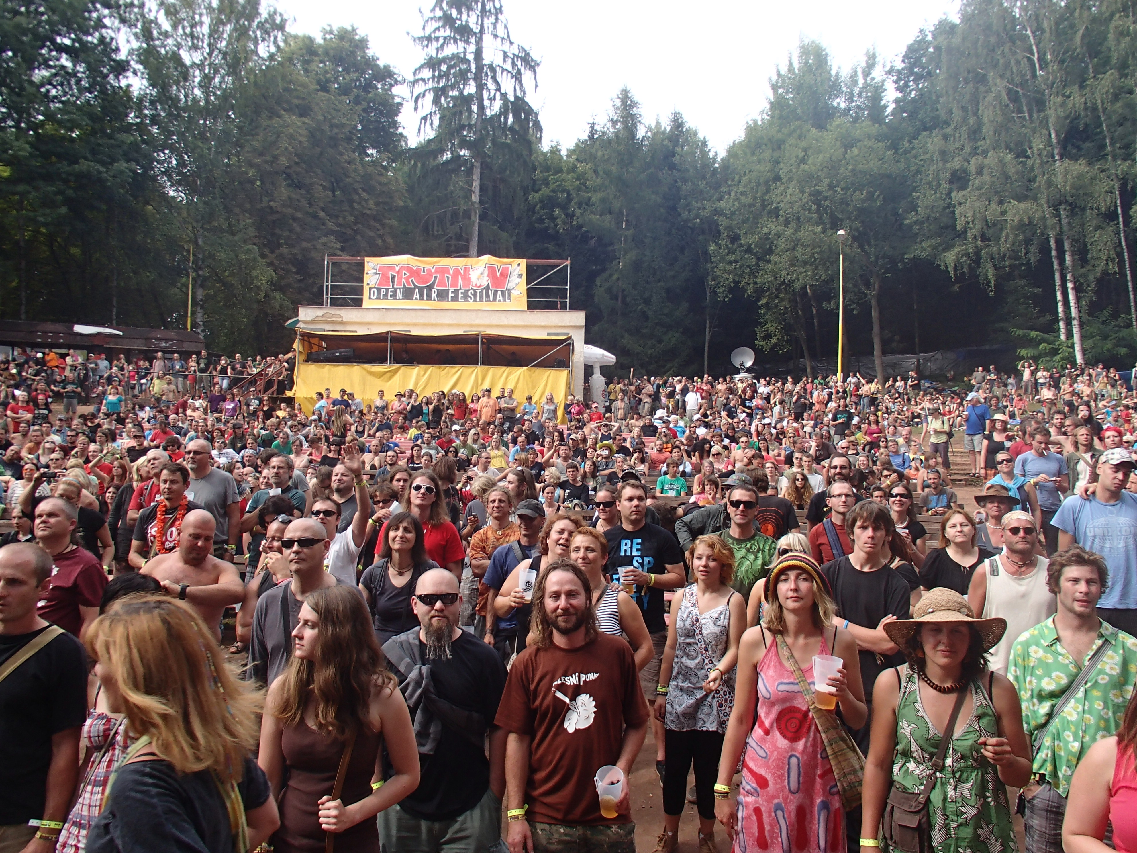 Trutnov Open Air Music Festival 2012